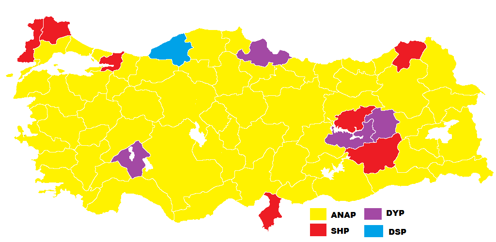 1987 genel seçimleri sonuçlarının Türkiye haritasında gösterimi.